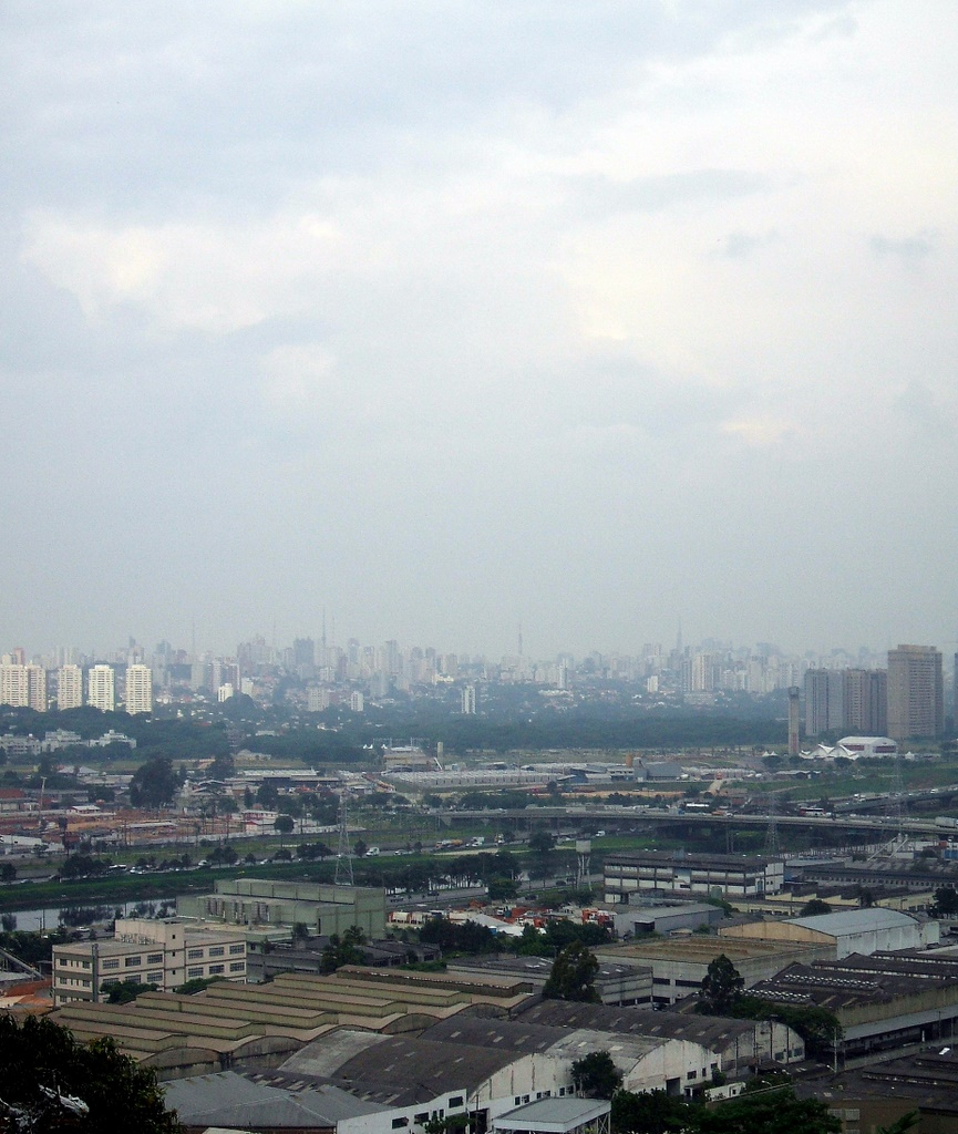 Vista aérea do centro industrial, no distrito do Jaguaré, cidade de São Paulo, Brasil